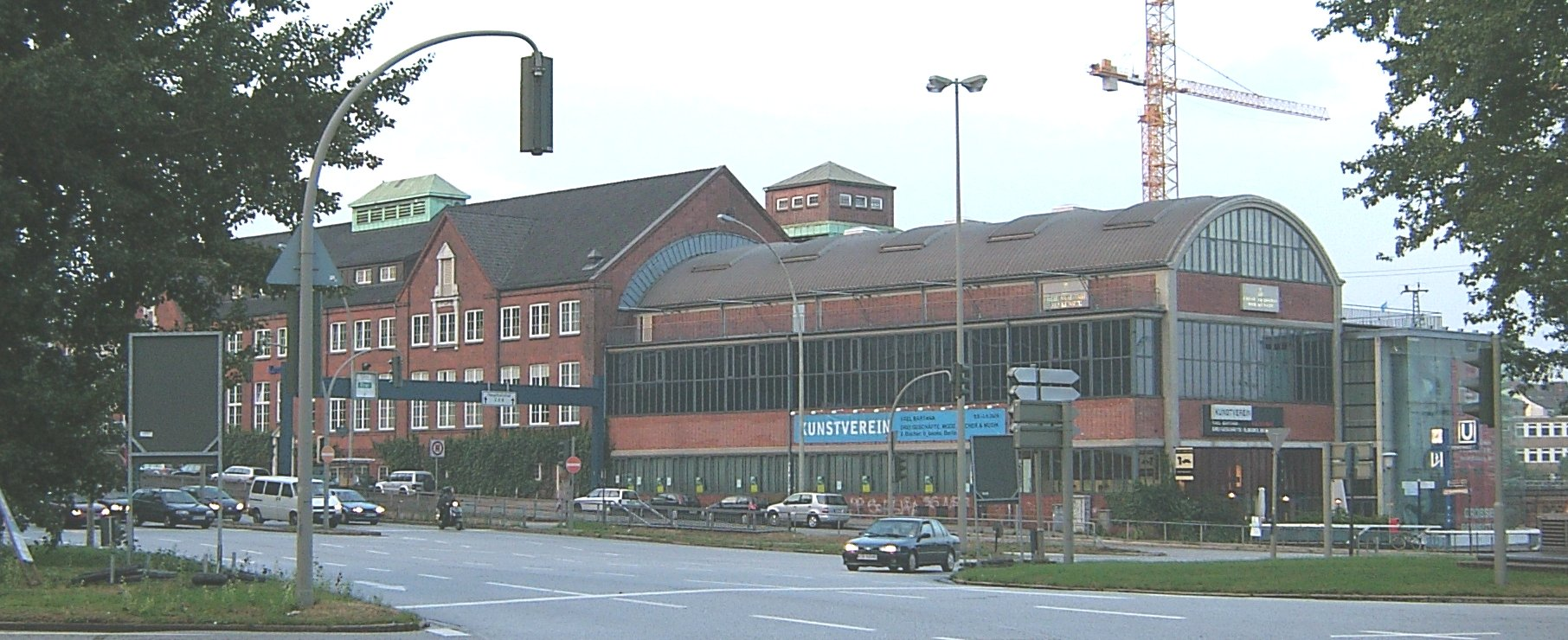 Der 1817 gegründete Kunstverein in Hamburg hat seinen Sitz im Erweiterungsbau der ehemaligen blumengroßmarkthalle in Hammerbrook.